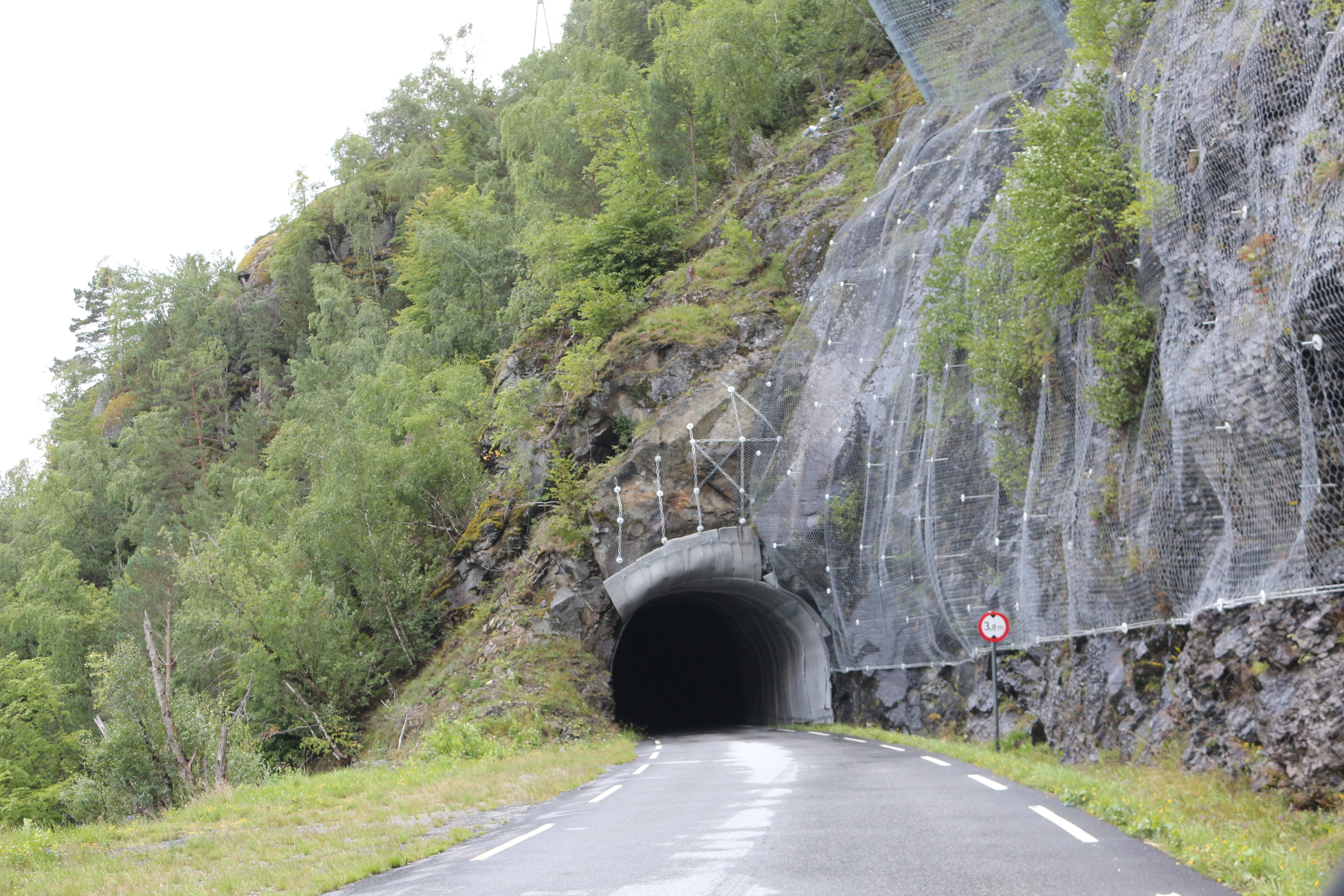 Berganetunnelen